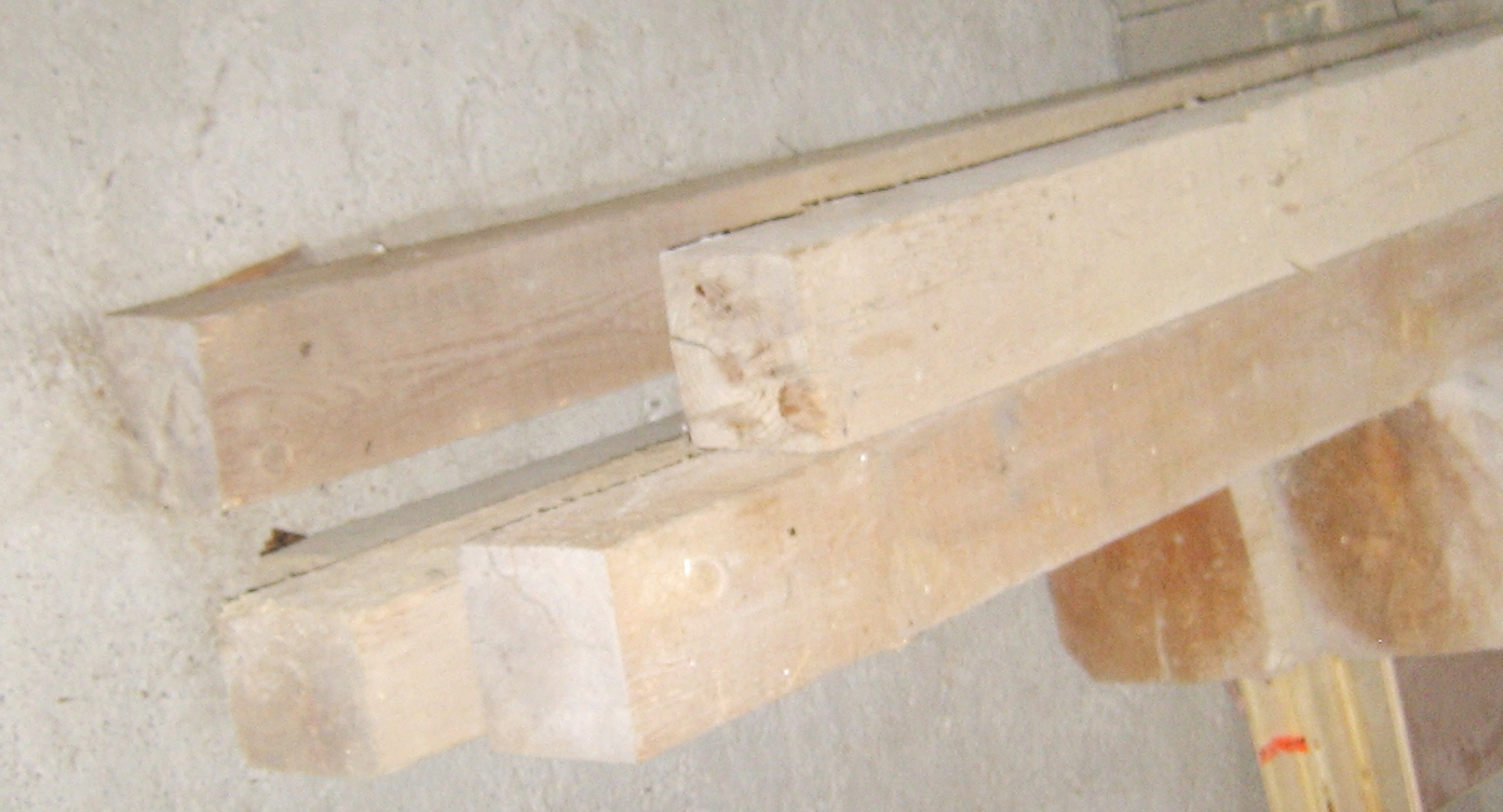 Kantholz